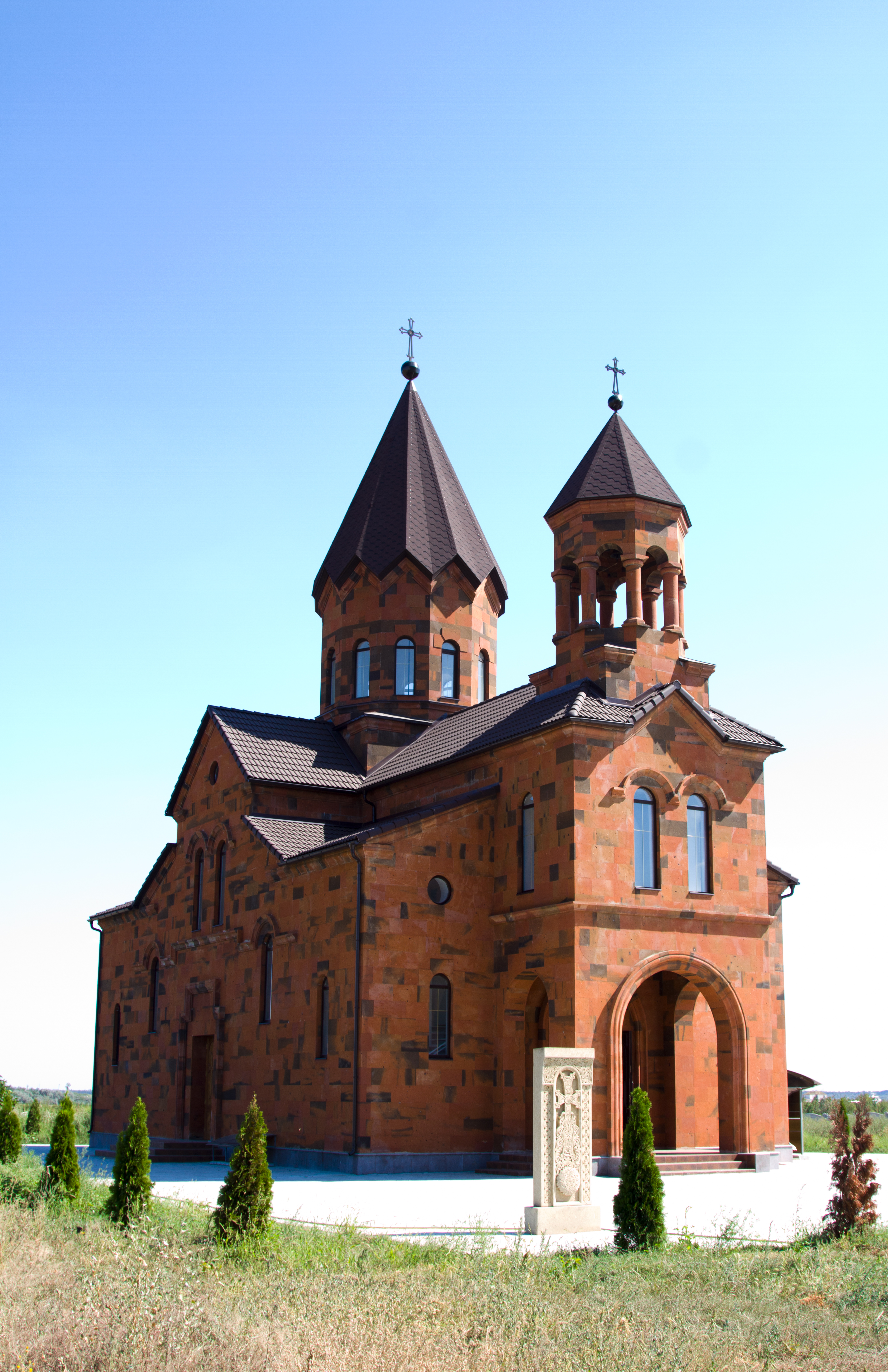 Церква Сурб Геворг. Архітектор Попов В.